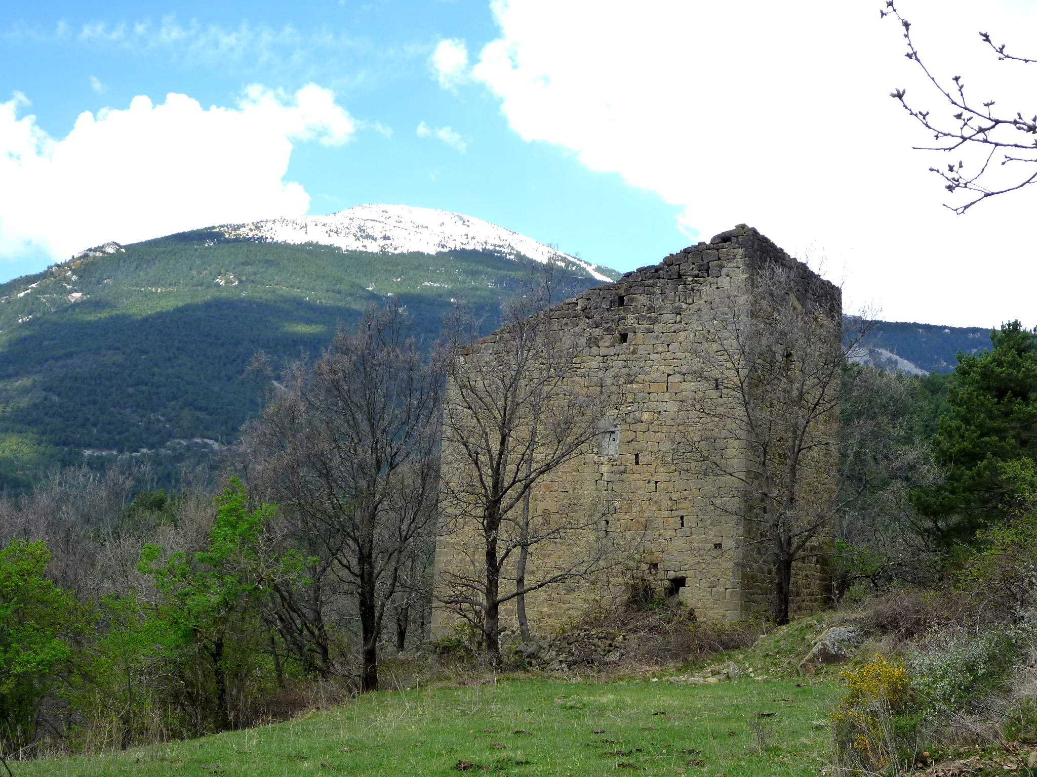 La Torre de la Vila, del municipi de la Coma i la Pedra, es retalla sobre el Cap de Querol, a la Bòfia.